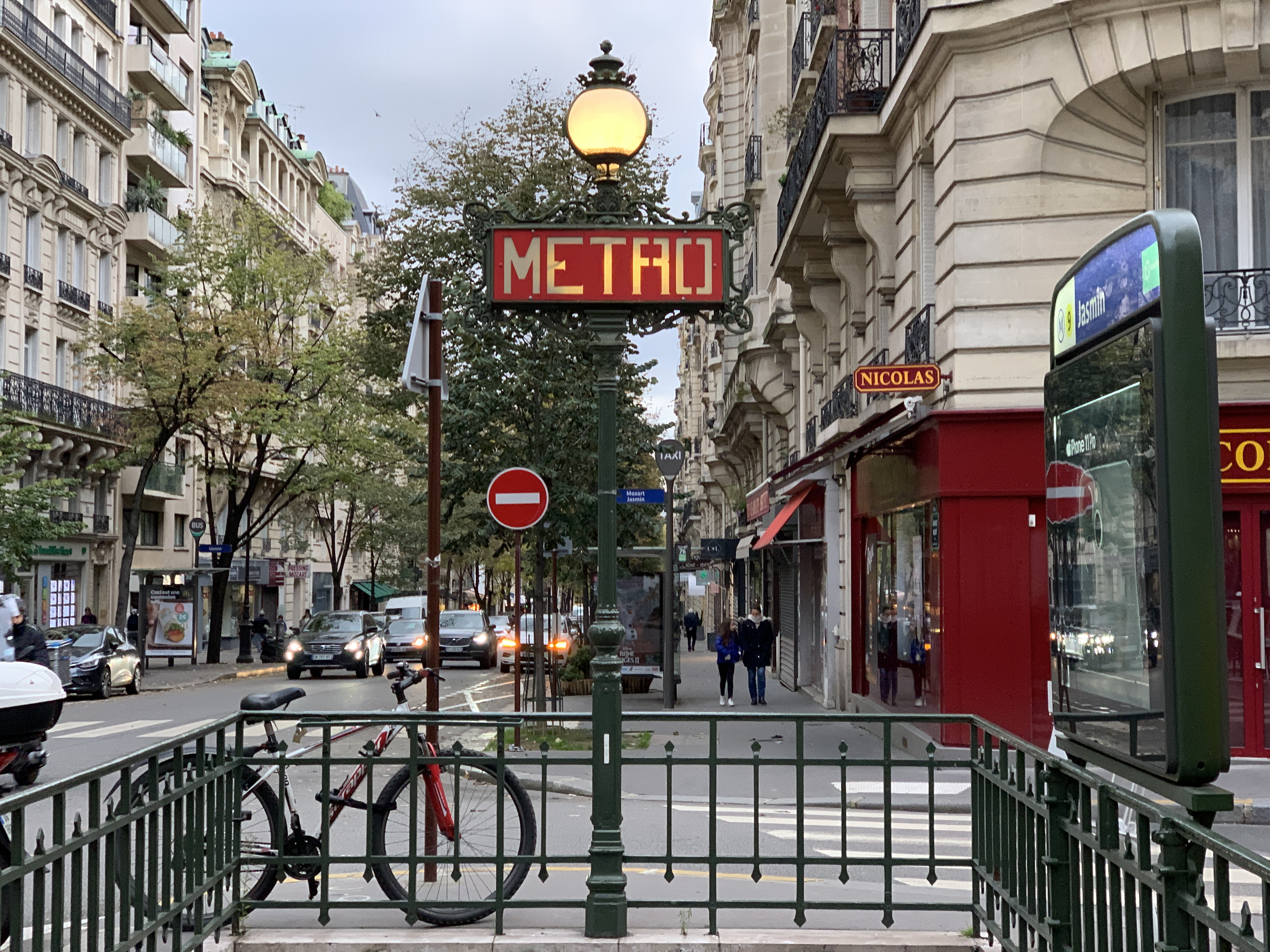 Entrée de la station de métro Jasmin, Paris.